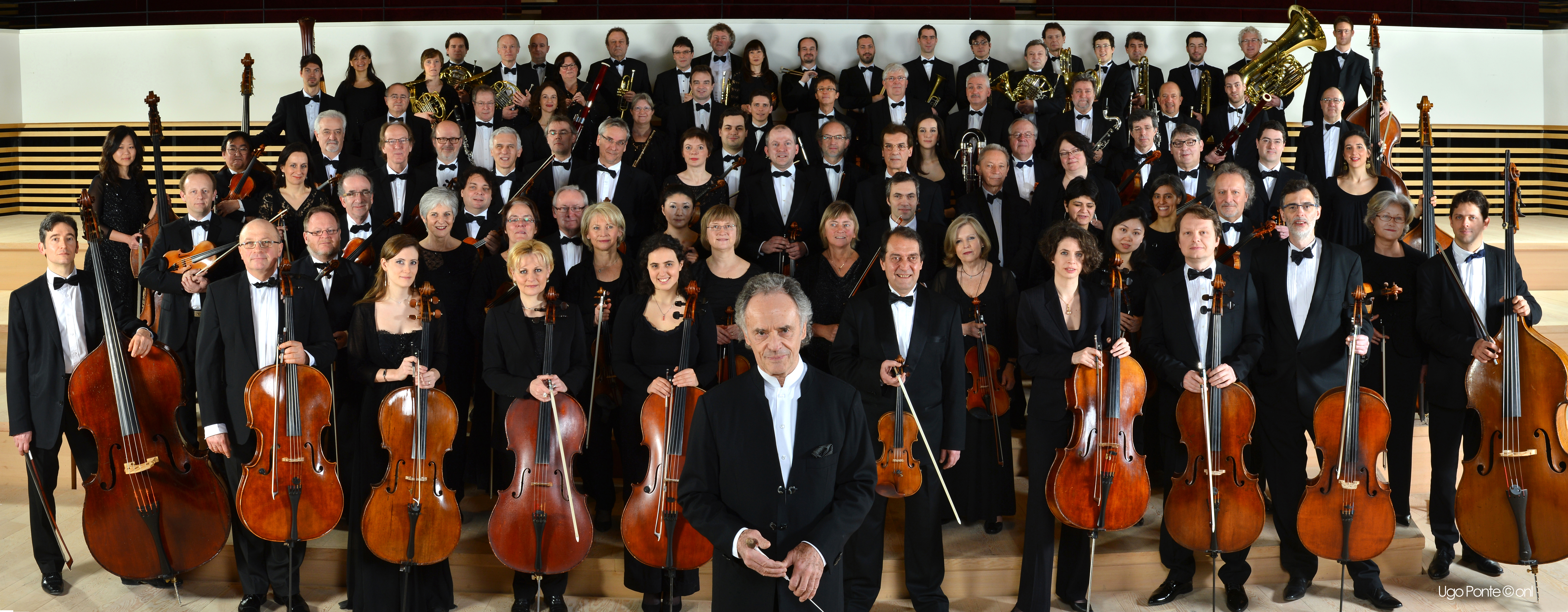 Jean-Claude Casadesus et l'orchestre national de lille. Photo officielle 2013